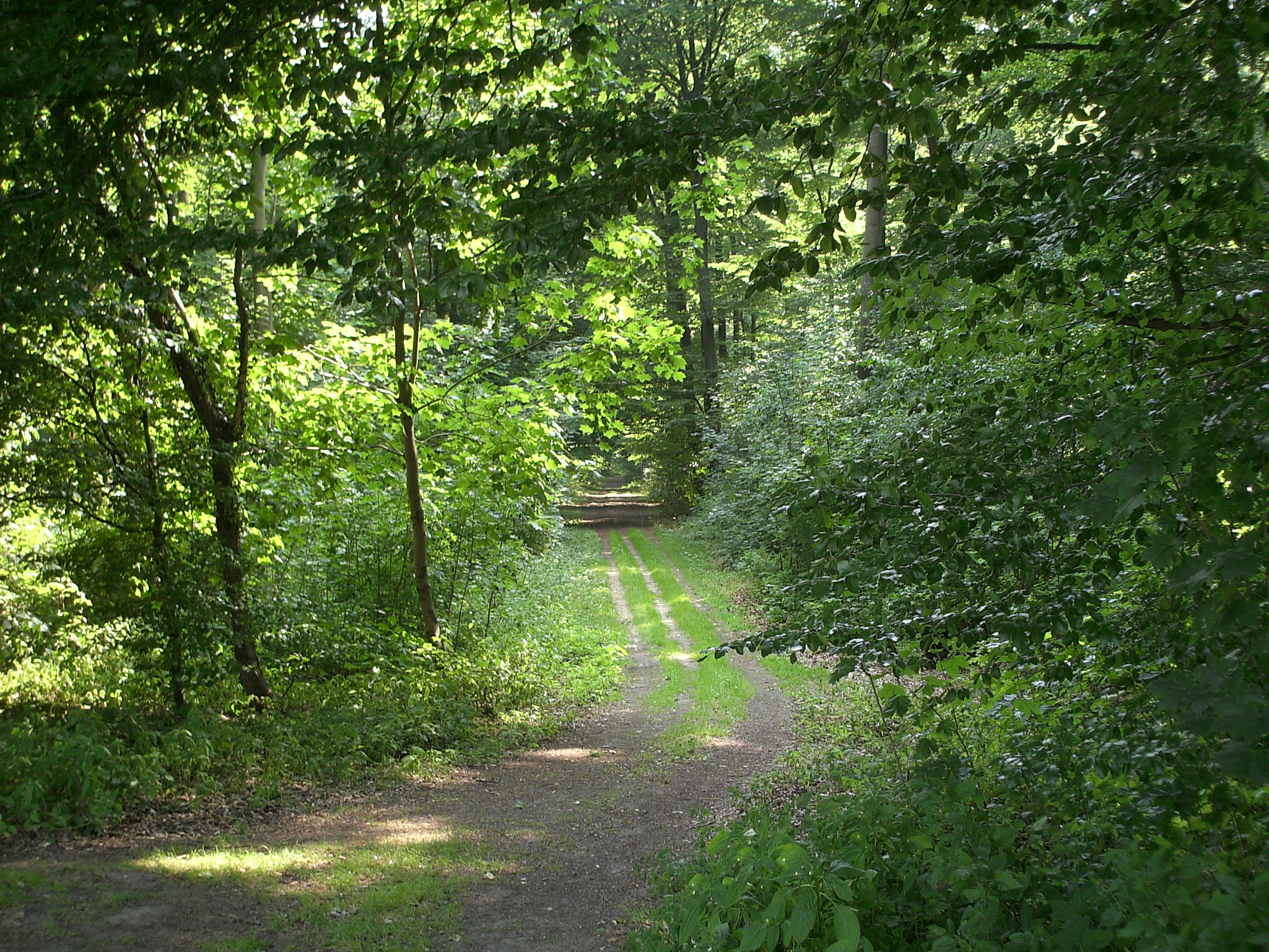 Ein Waldweg nahe der Kleinstadt Ebstorf